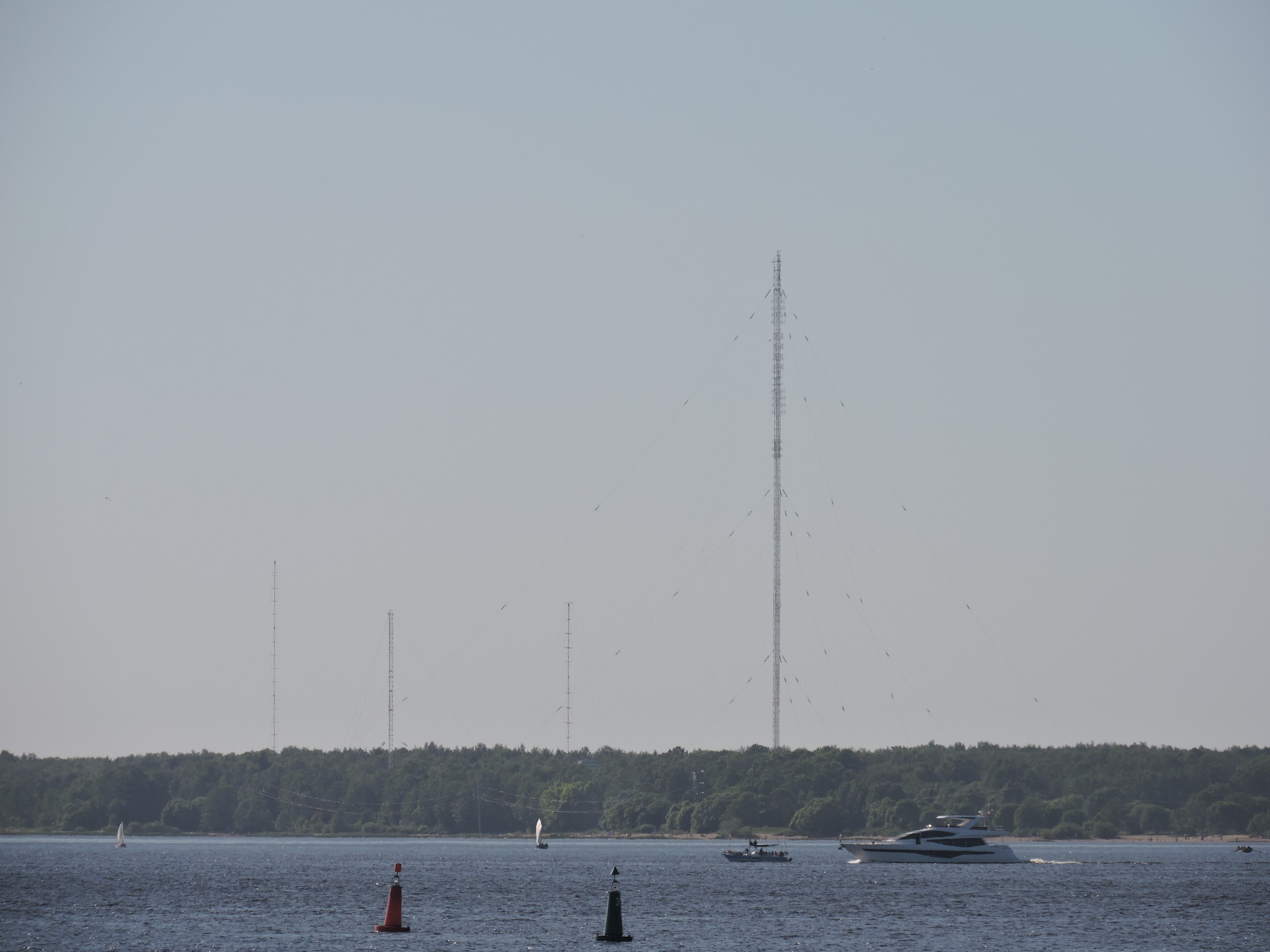 Радиоцентр Ольгино. Самая высокая мачта имеет 187 метров высоты